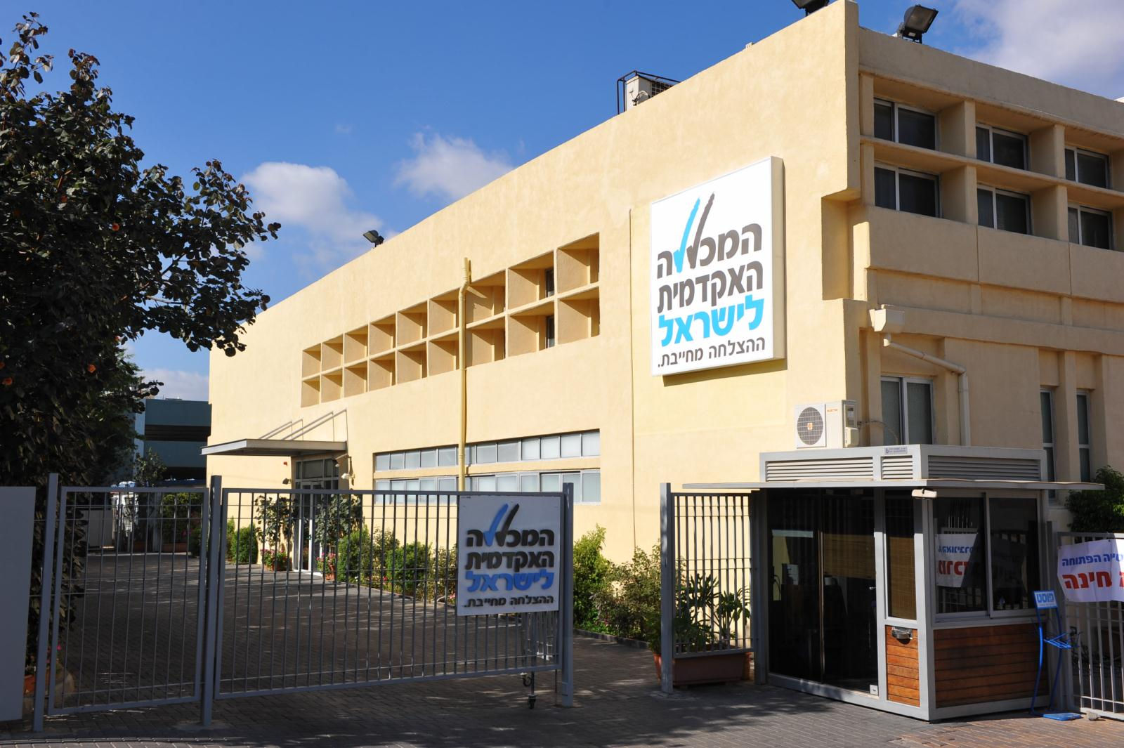 iac